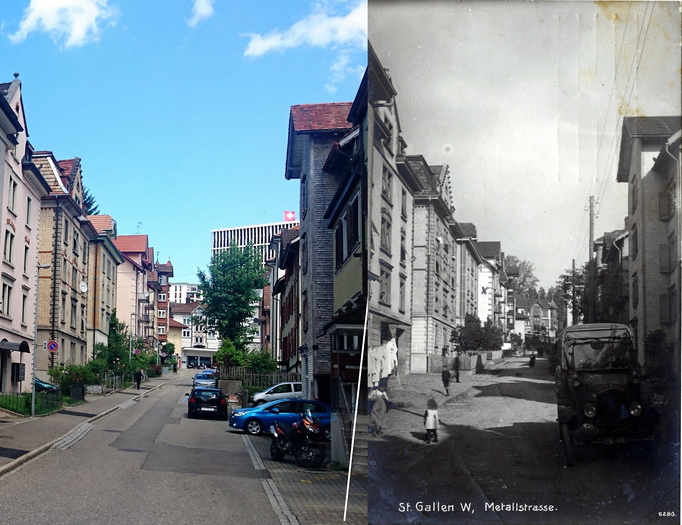 Metallstrasse im Quartier St. Gallen/Lachen. Aufnahmen 2017 und 1920 im Vergleich